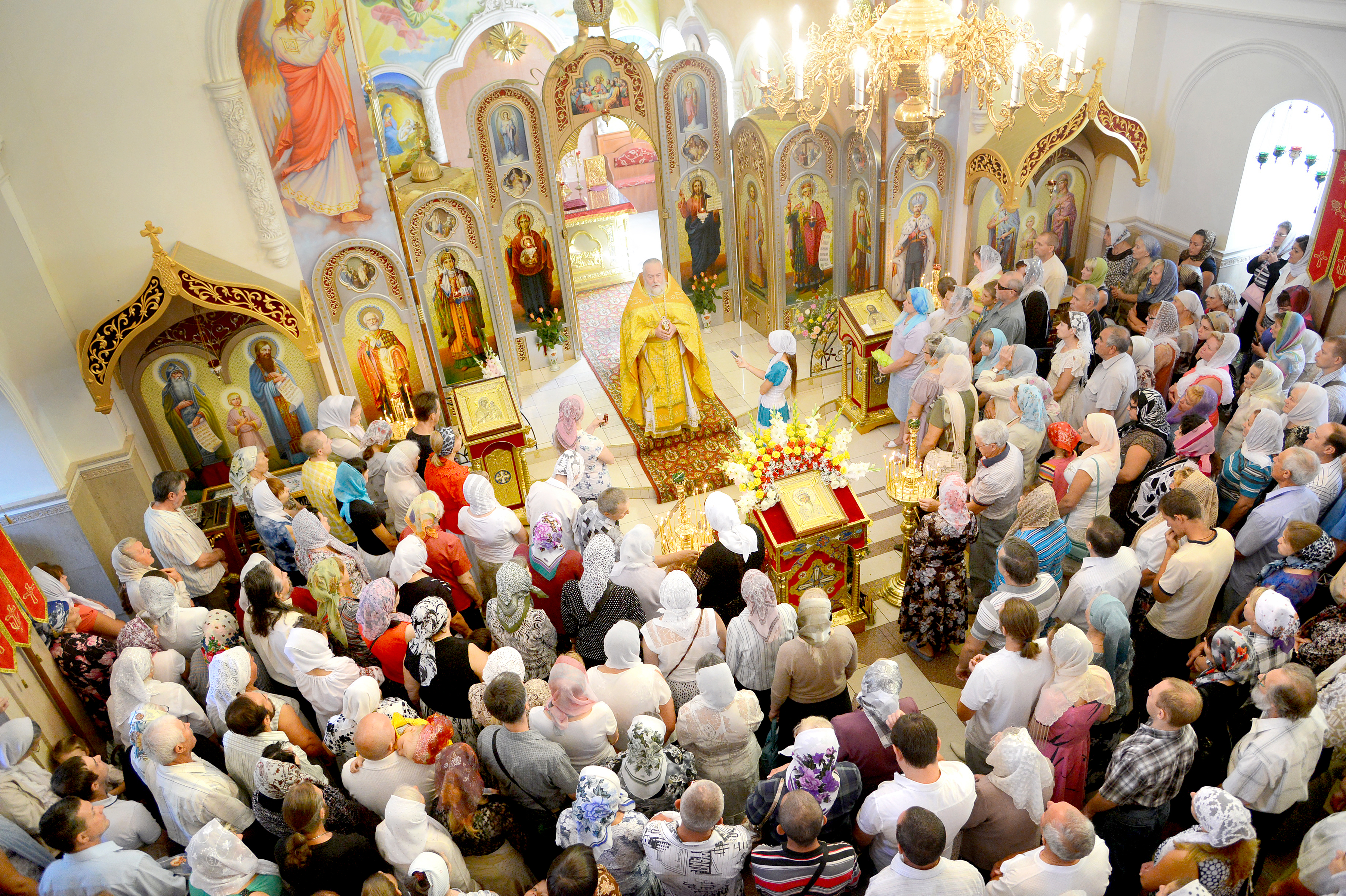 Храм Святого Равноапостольного князя Владимира (Украина , Днепропетровск)